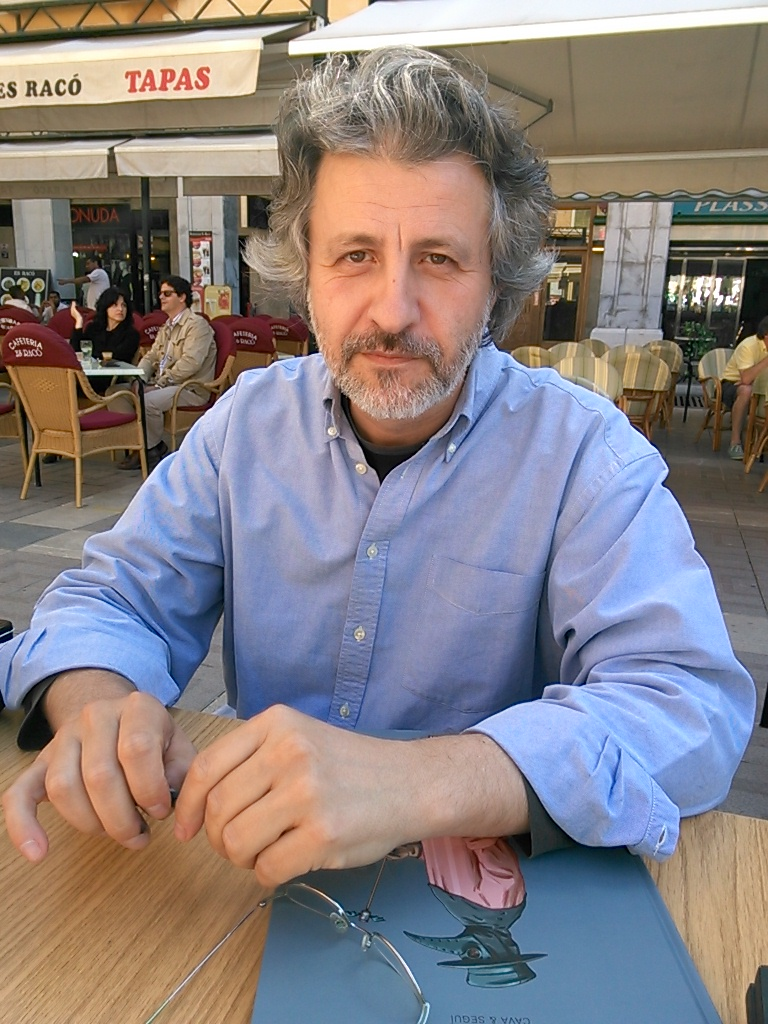 Tomeu Seguí. Plaça major de Palma (Mallorca). Sant Jordi 2014